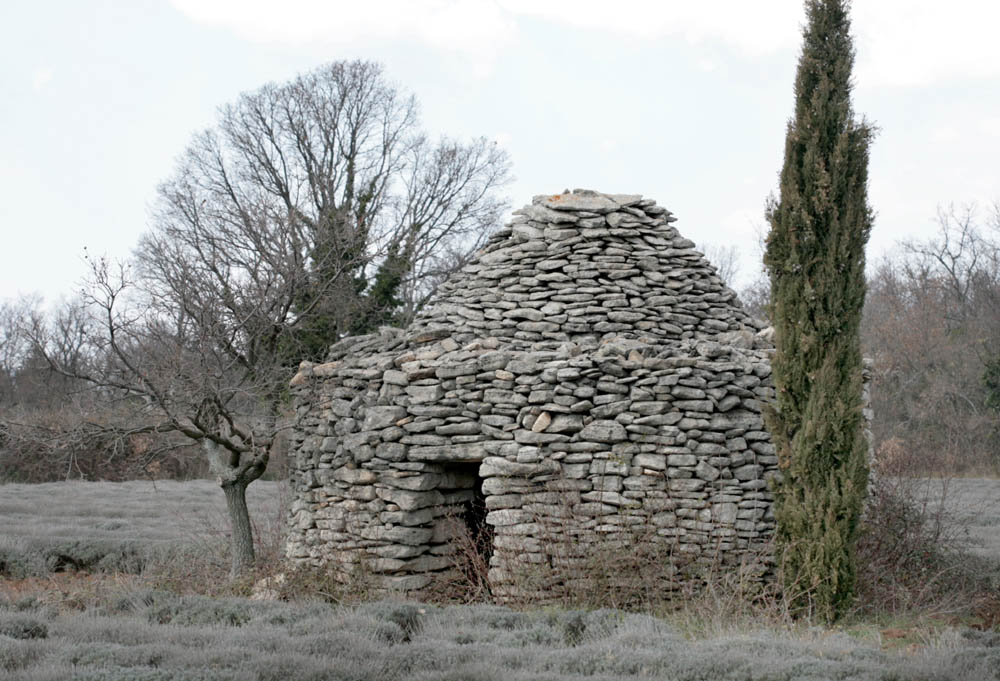 Borie on "le plateau des Claparedes" in Bonnieux, France